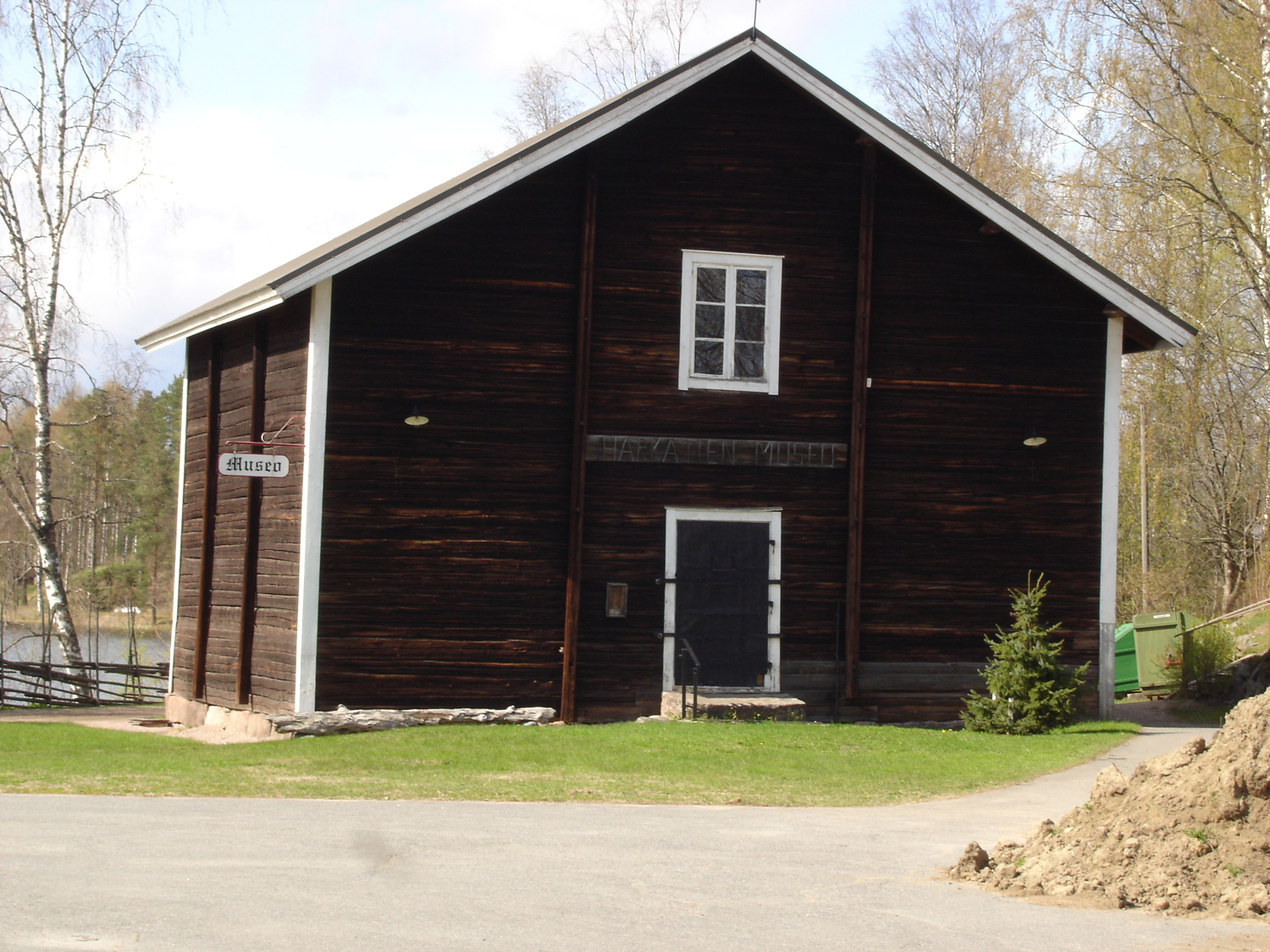 Härkätiemuseo Rengossa